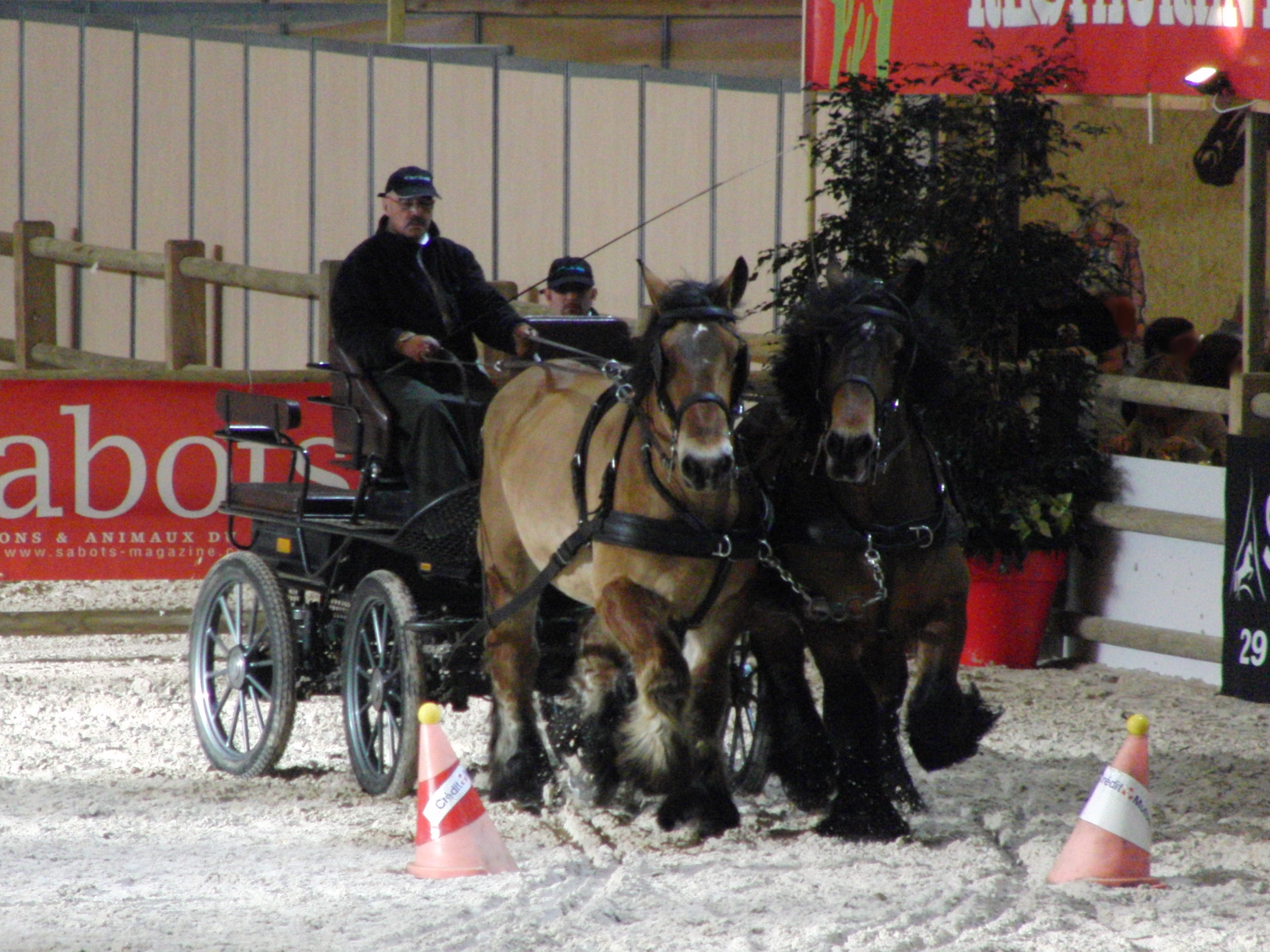 Attelage de chevaux Trait du Nord lors de la Paris Cup de Traction Animale (épreuve de Maniabilité), Salon du cheval de Paris 2014, Parc des expositions de Paris-Nord Villepinte, France